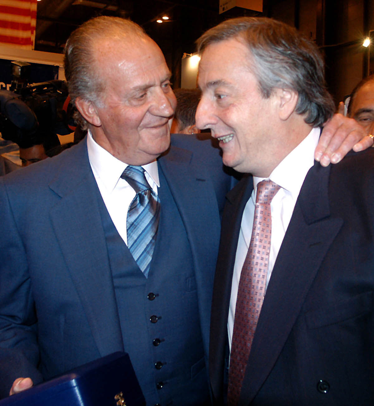 'Néstor Kirchner y el Rey Juan Carlos de España Date: January, 2004